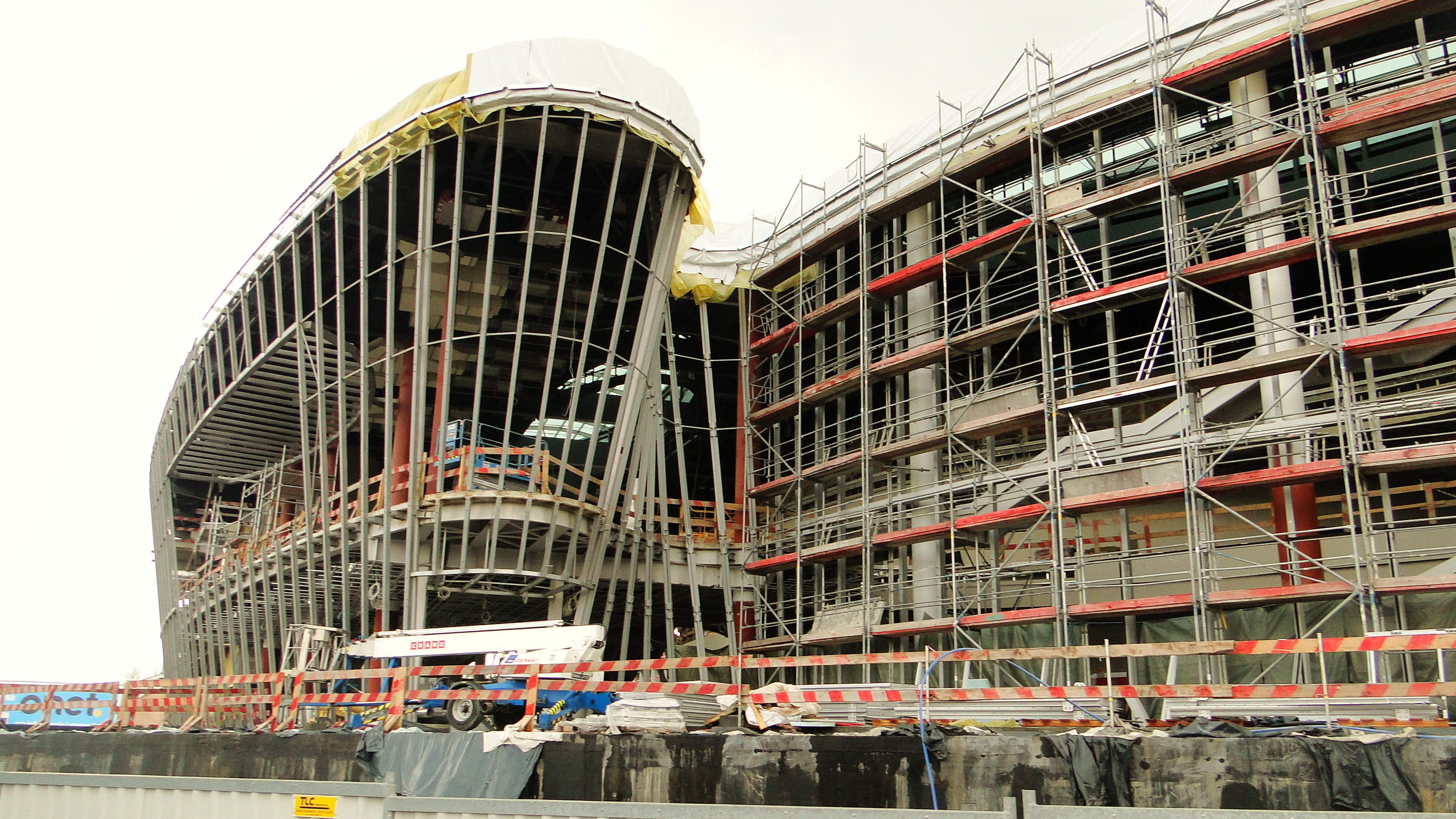 ICE Kraków - budowa - kwiecień 2014